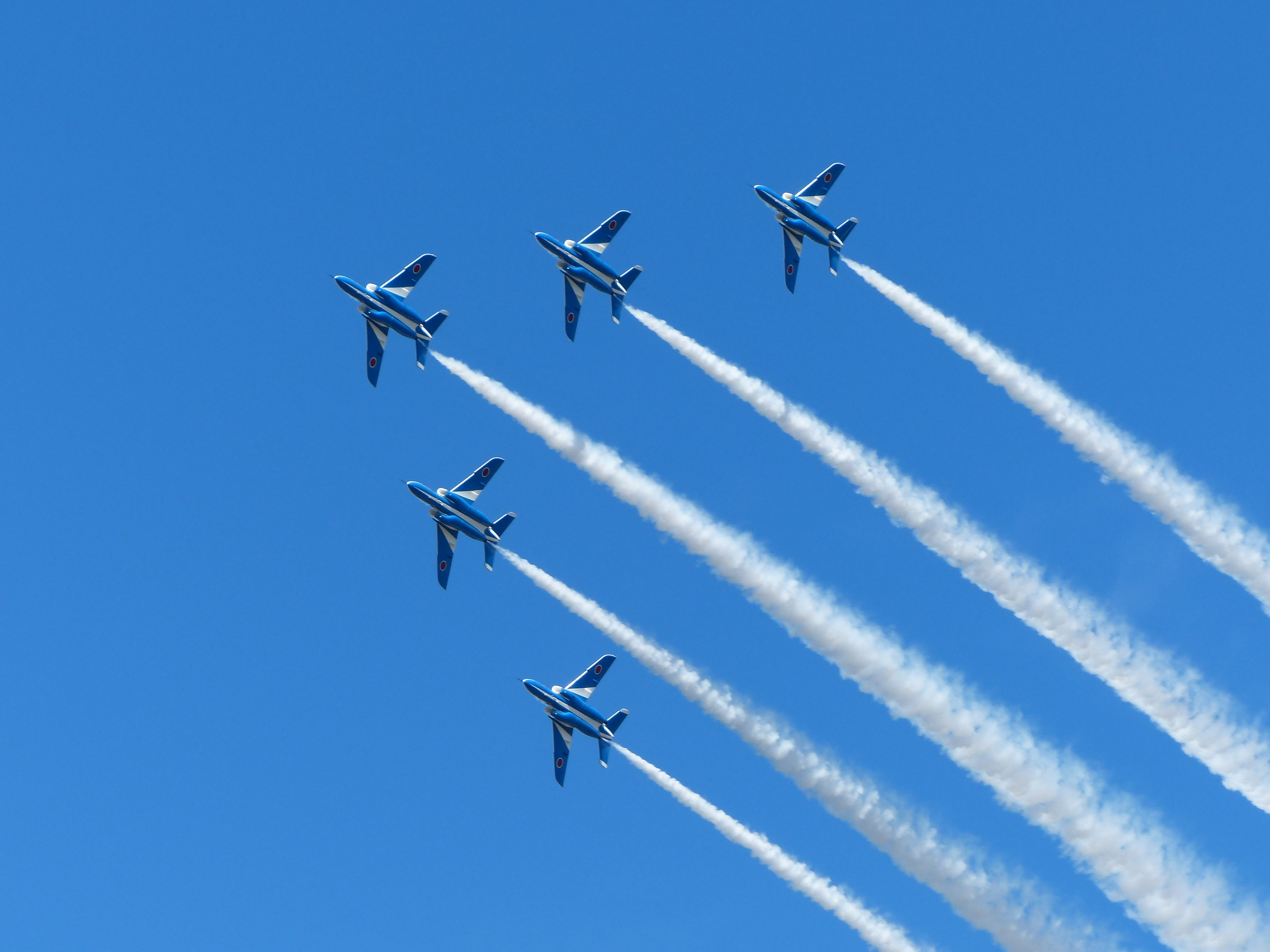 2013年小松基地航空祭予行時のもの。